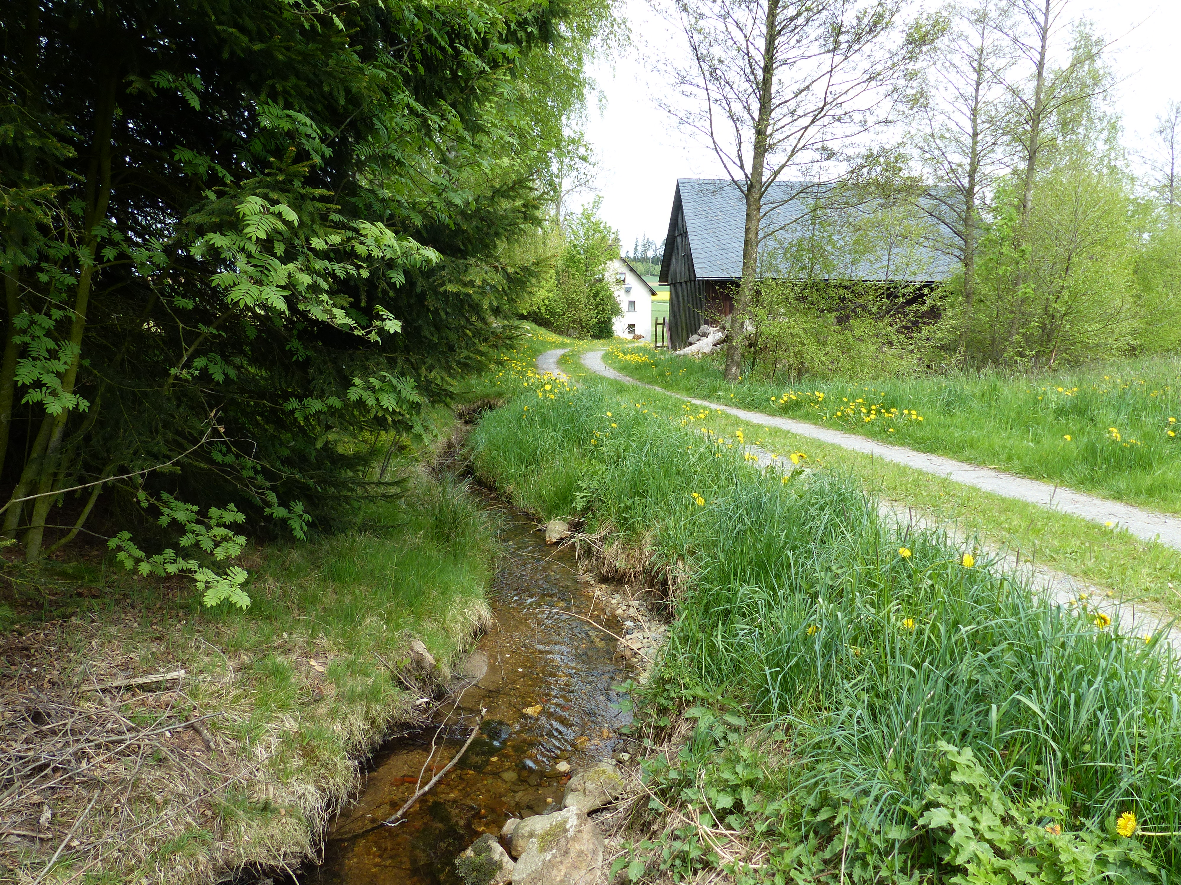 Ansicht der Lohmühle